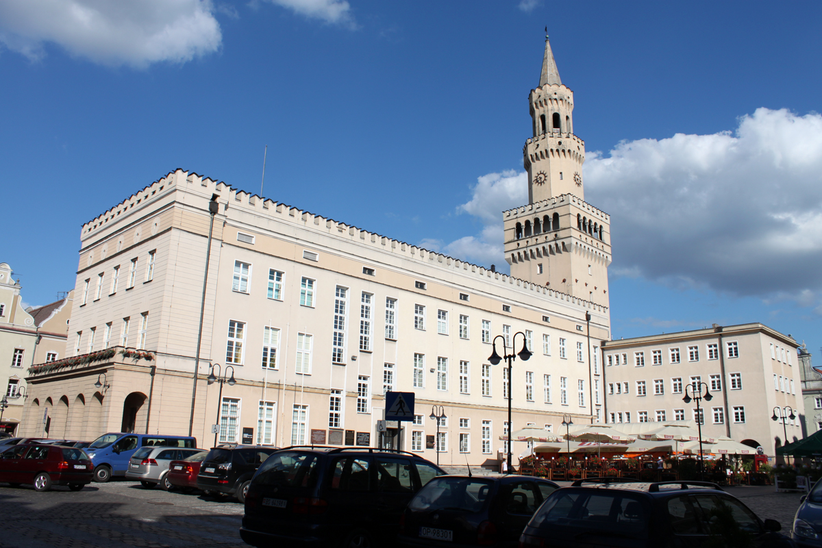 Widok od strony skrzyżowania ulicy Koraszewskiego i Młyńskiej